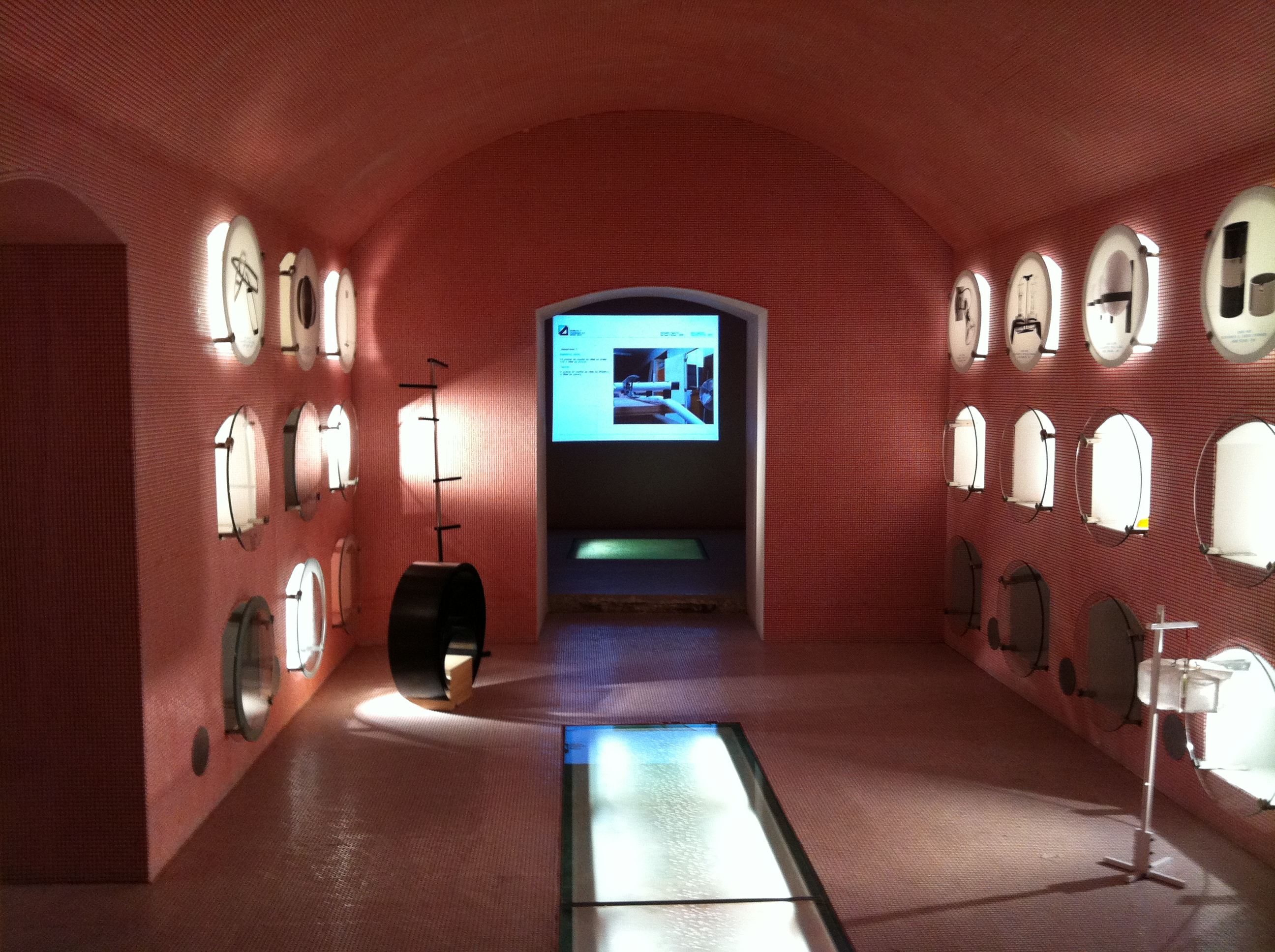 Foment de les Arts i el Disseny